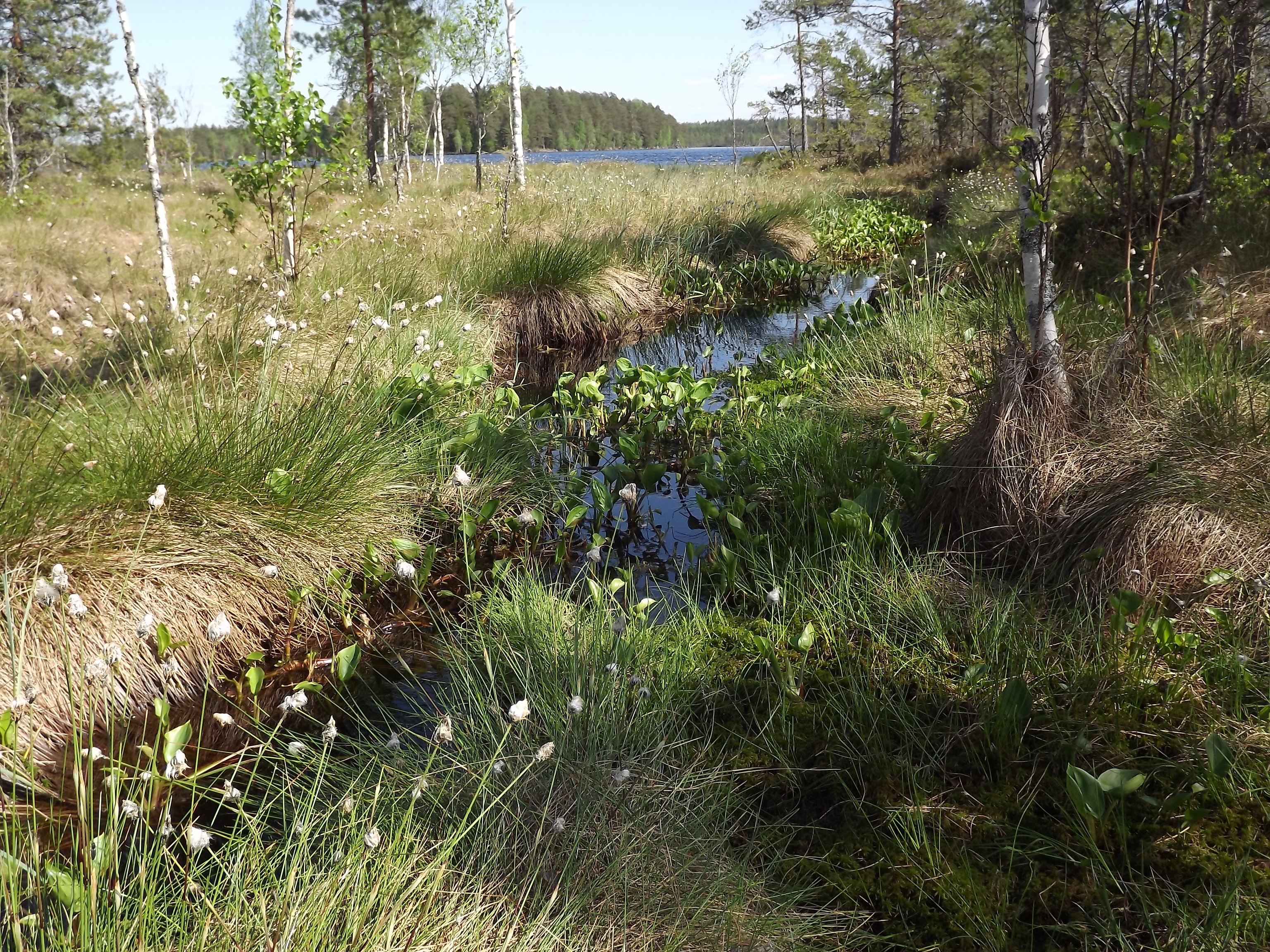 Bäck och tuvull i Lammenrahka-mossen i Pöytyä, Kurjenrahka nationalpark. Sjön Savojärvi i bakgrunden.